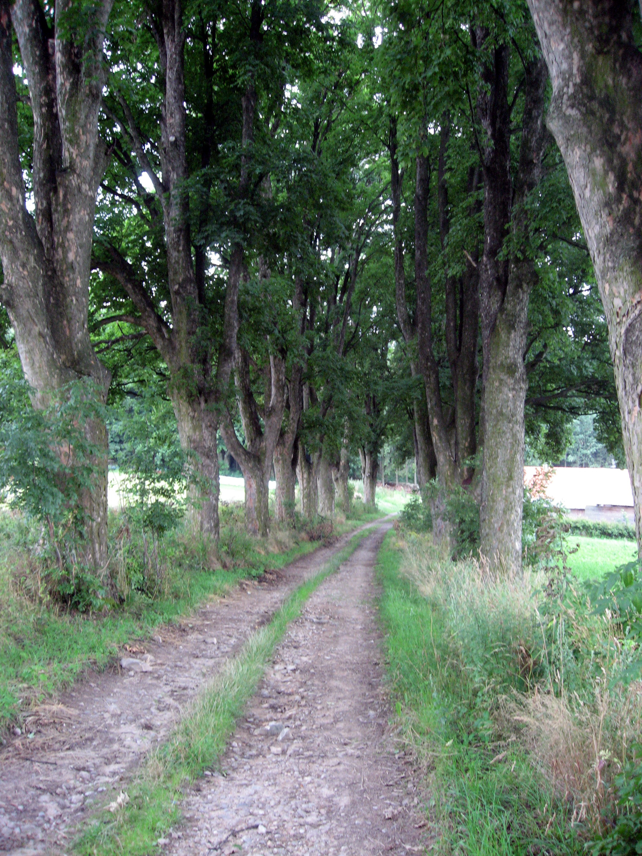 Klenová alej u Koječína